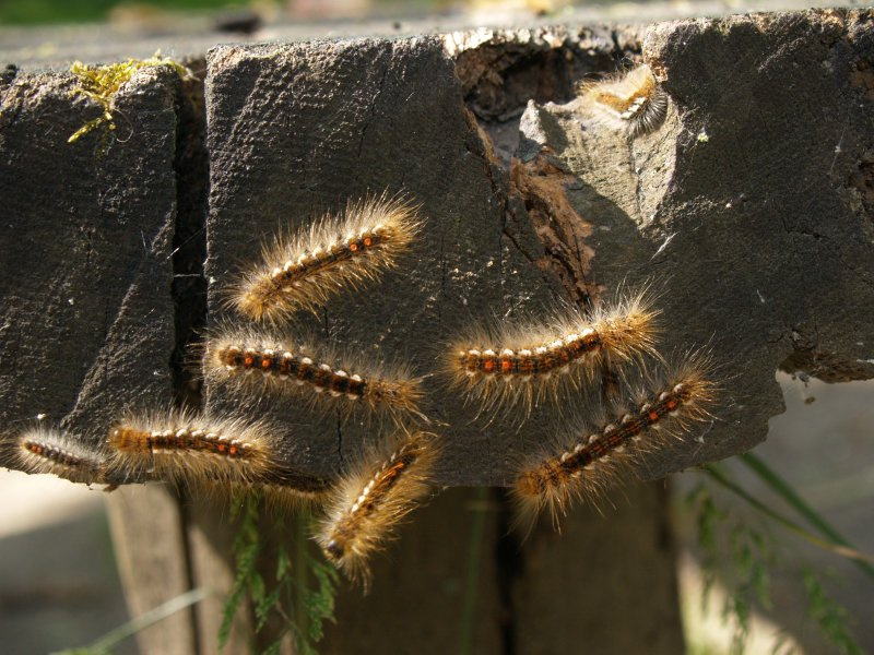 Stado kuprówki rudnicy (Euproctis chrysorrhoea syn. Sphrageidus chrysorrhoea) grasujące w lasach w okolicach Wrocławia.